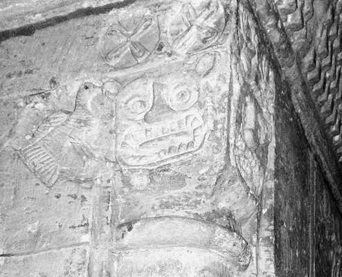 Wotan Saeule